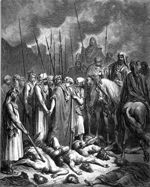 "Joshua spares Rahab" (Jos 6:25)